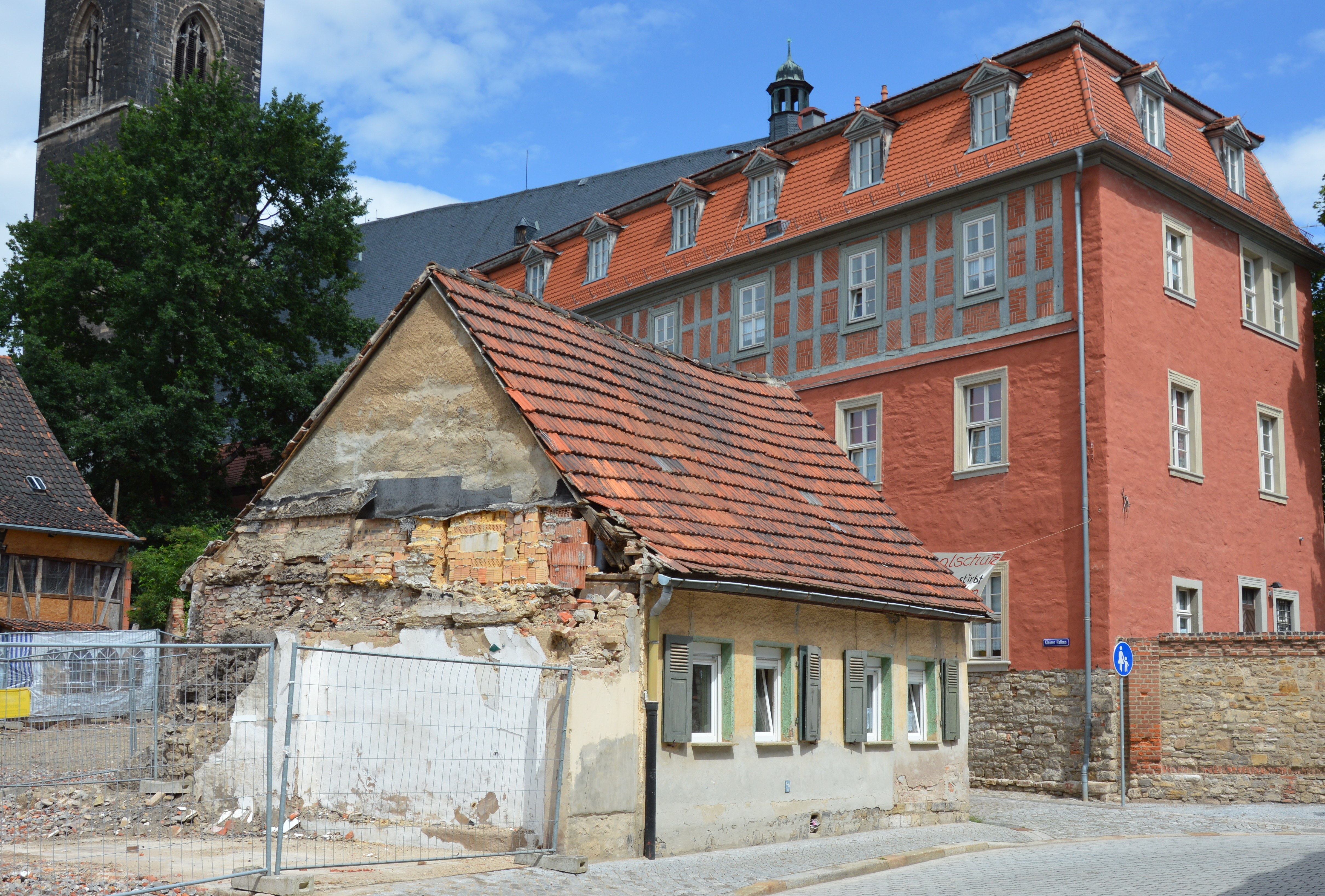 Haus Kleiner Halken 4 in Aschersleben